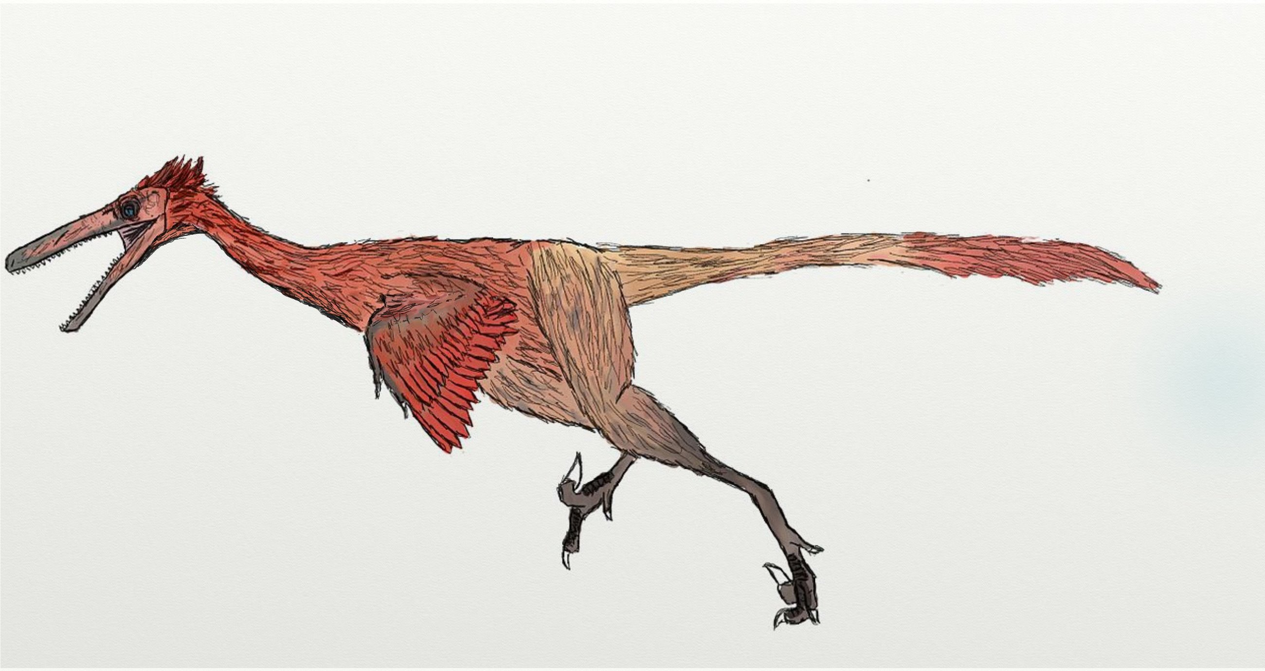 Buitreraptor gonzalezorum